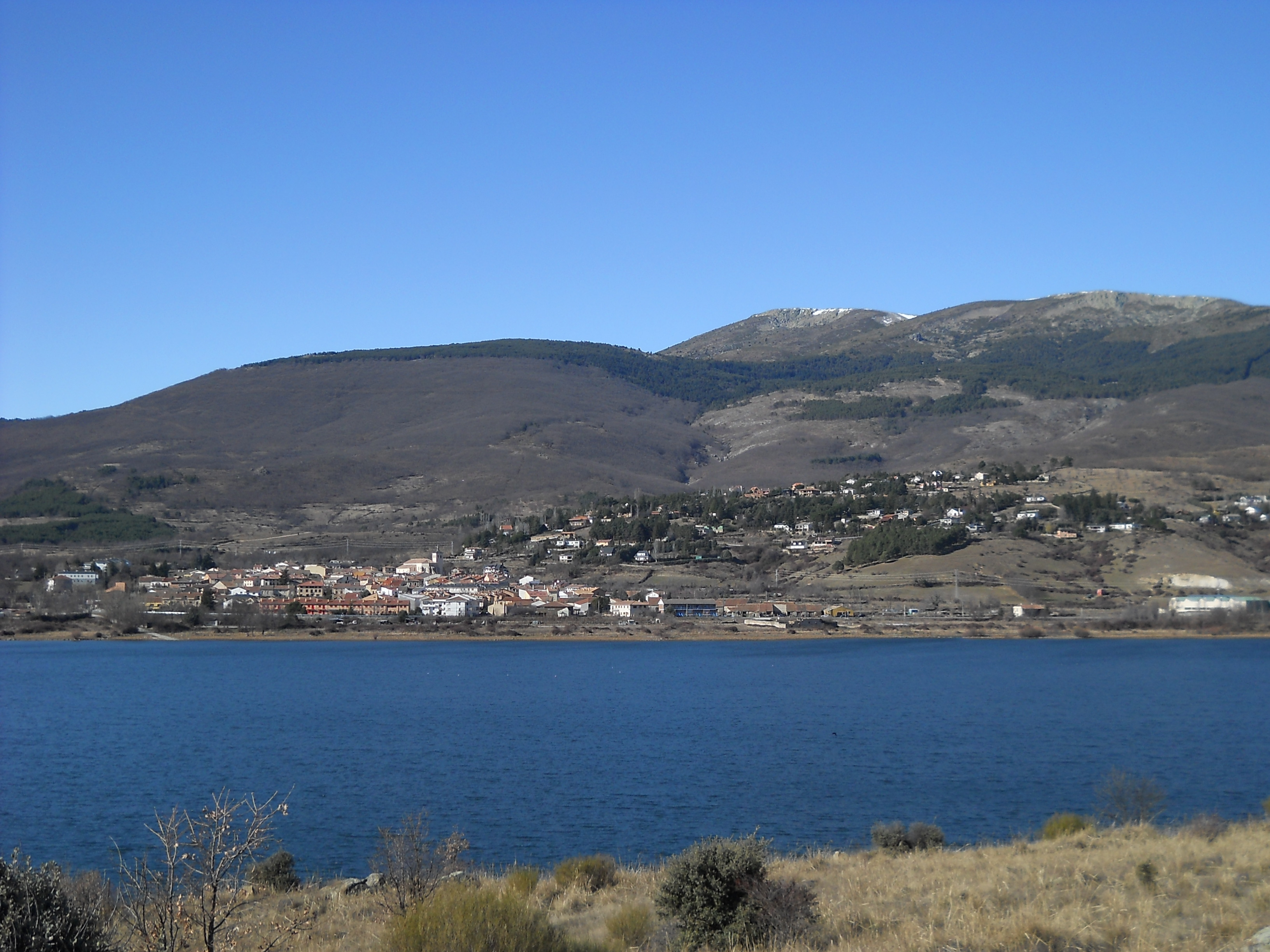 Lozoya visto desde el embalse de Pinilla, Comunidad de Madrid, España; en el fondo el Pico el Nevero